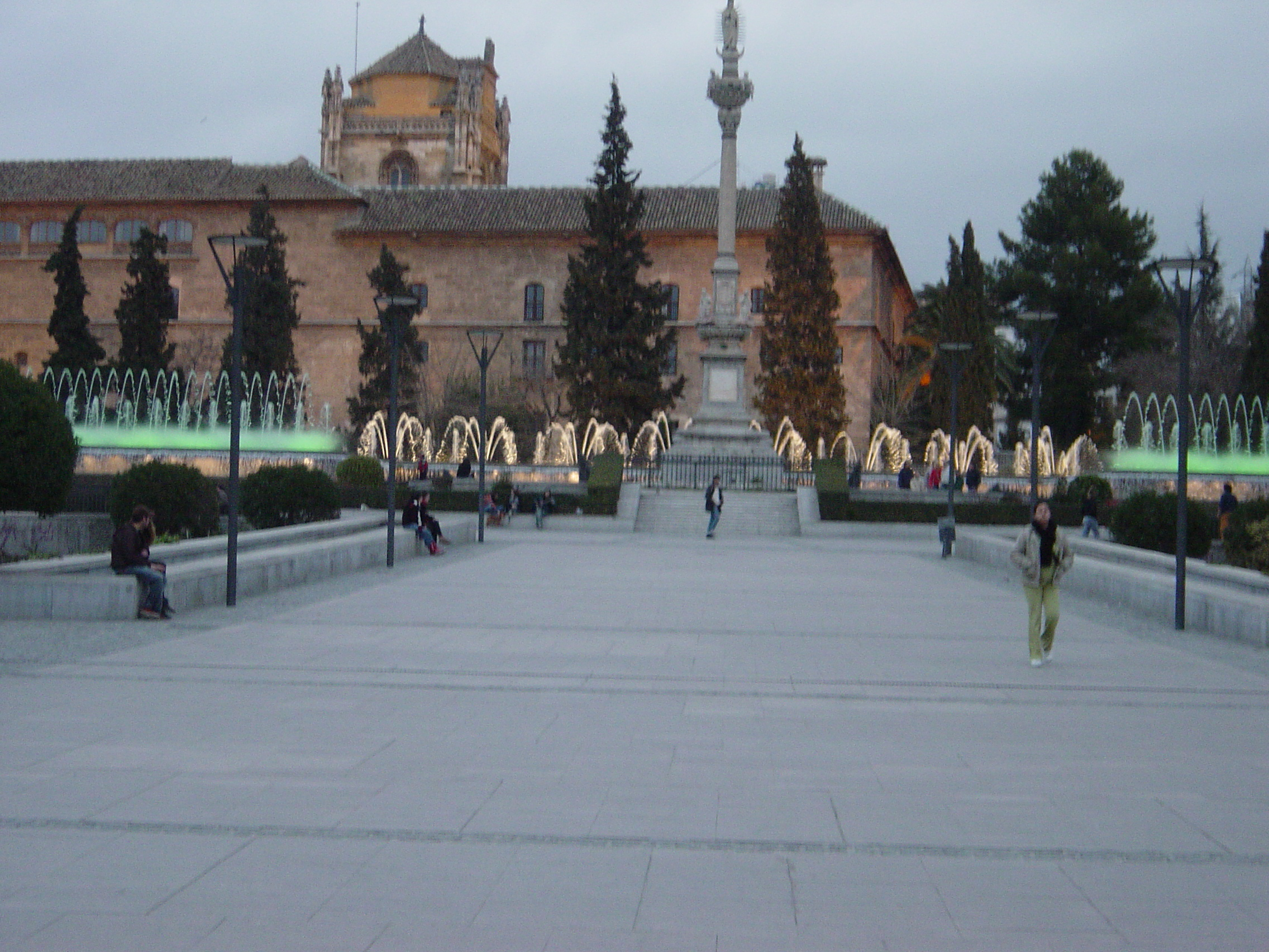 トリウンフォ公園、グラナダ、スペイン